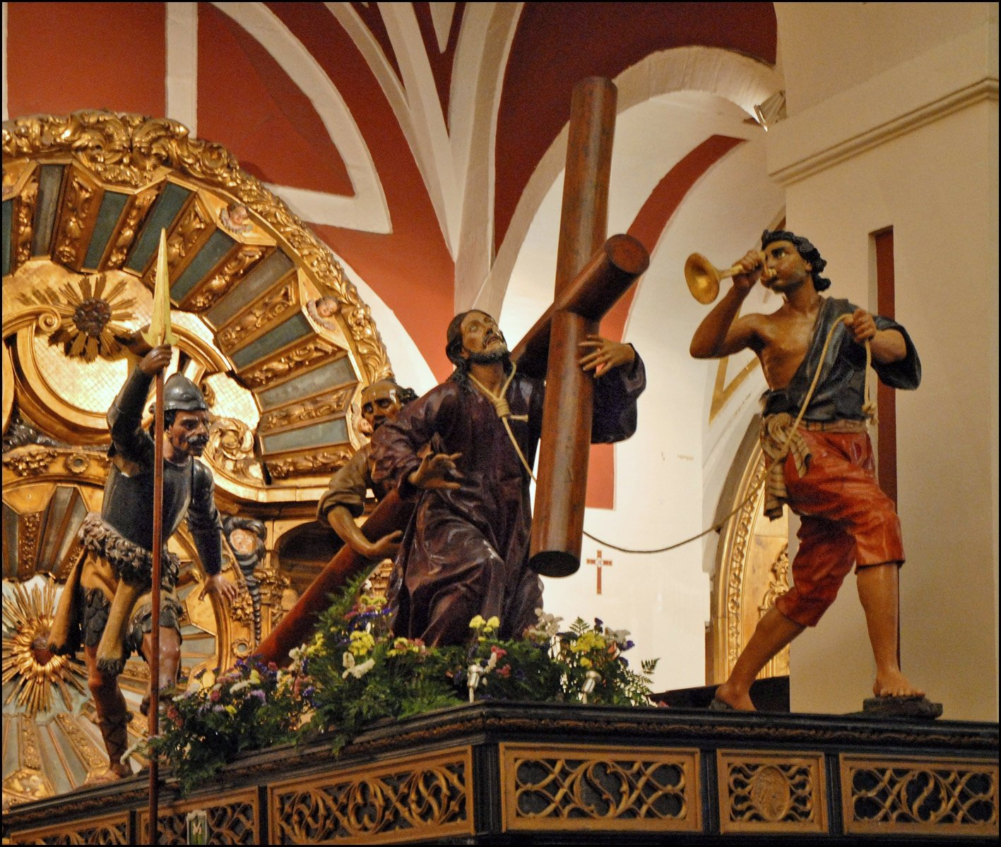 Autel (paso) porté à dos d'homme durant les processions pour la commémoration de la Résurrection du Christ et illustrant la cinquième station du Chemin de croix : Simon de Cyrène aide Jésus à porter sa croix. Les processions du vendredi saint célèbrent la passion du Christ. Durant la semaine sainte à Bilbao, 14 processions sur la Passion du Christ sont organisées, par les différentes confréries de Pénitents, à travers la ville, depuis le dimanche des Rameaux jusqu'à celui de Pâques Bilbao célèbre Pâques depuis 1554, l'année de fondation de la "Guilde" des Pénitents de Vera Cruz.